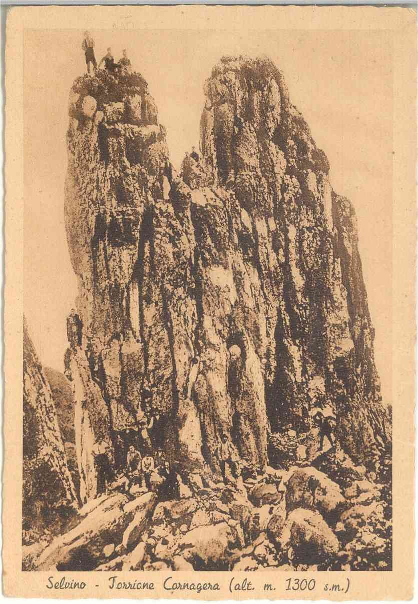 BG Selvino - Torrione Cornagera (alt. m.1300 s.m.)